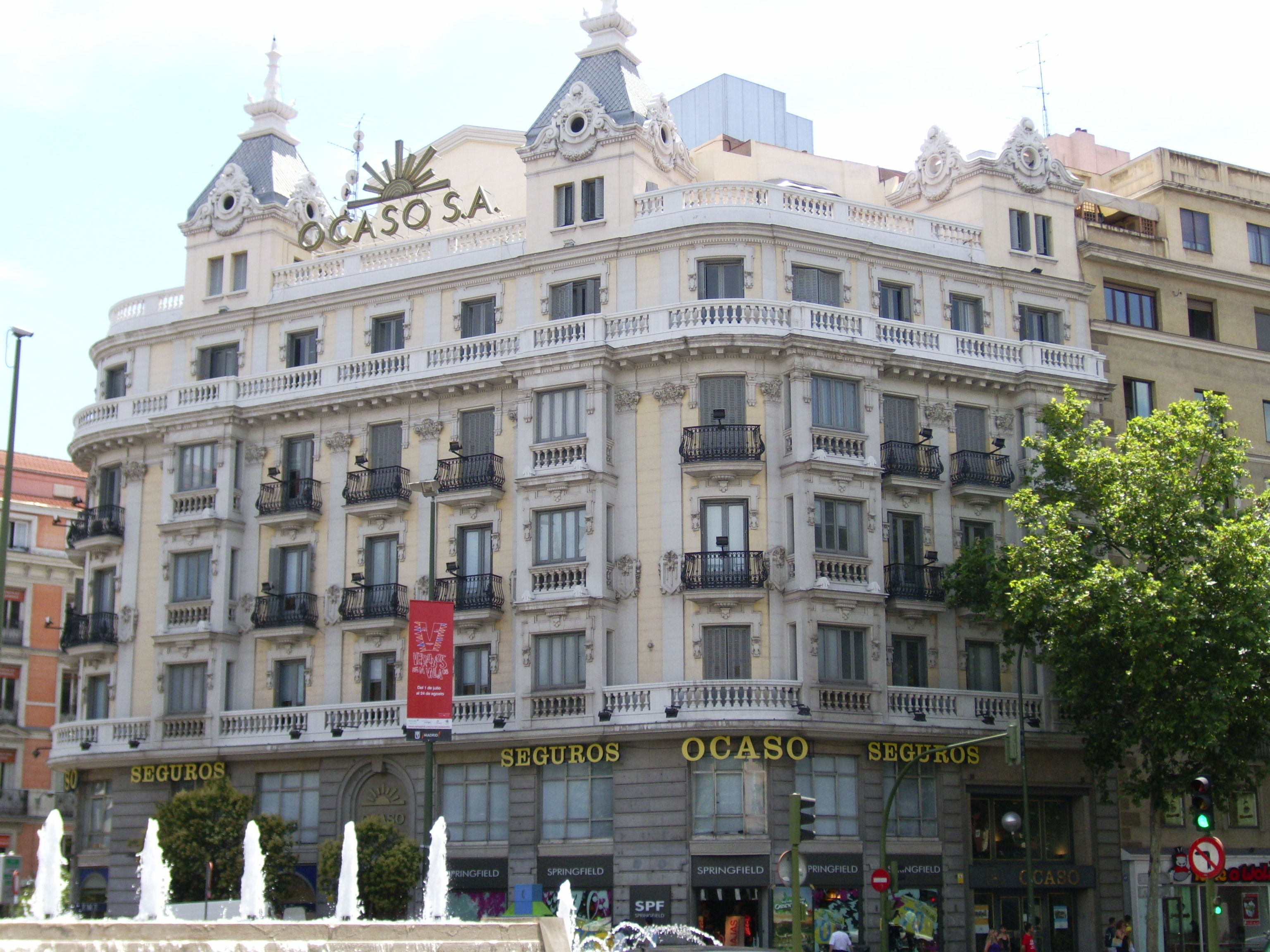 Edificio de Seguros Ocaso en la Glorieta de Bilbao, Madrid